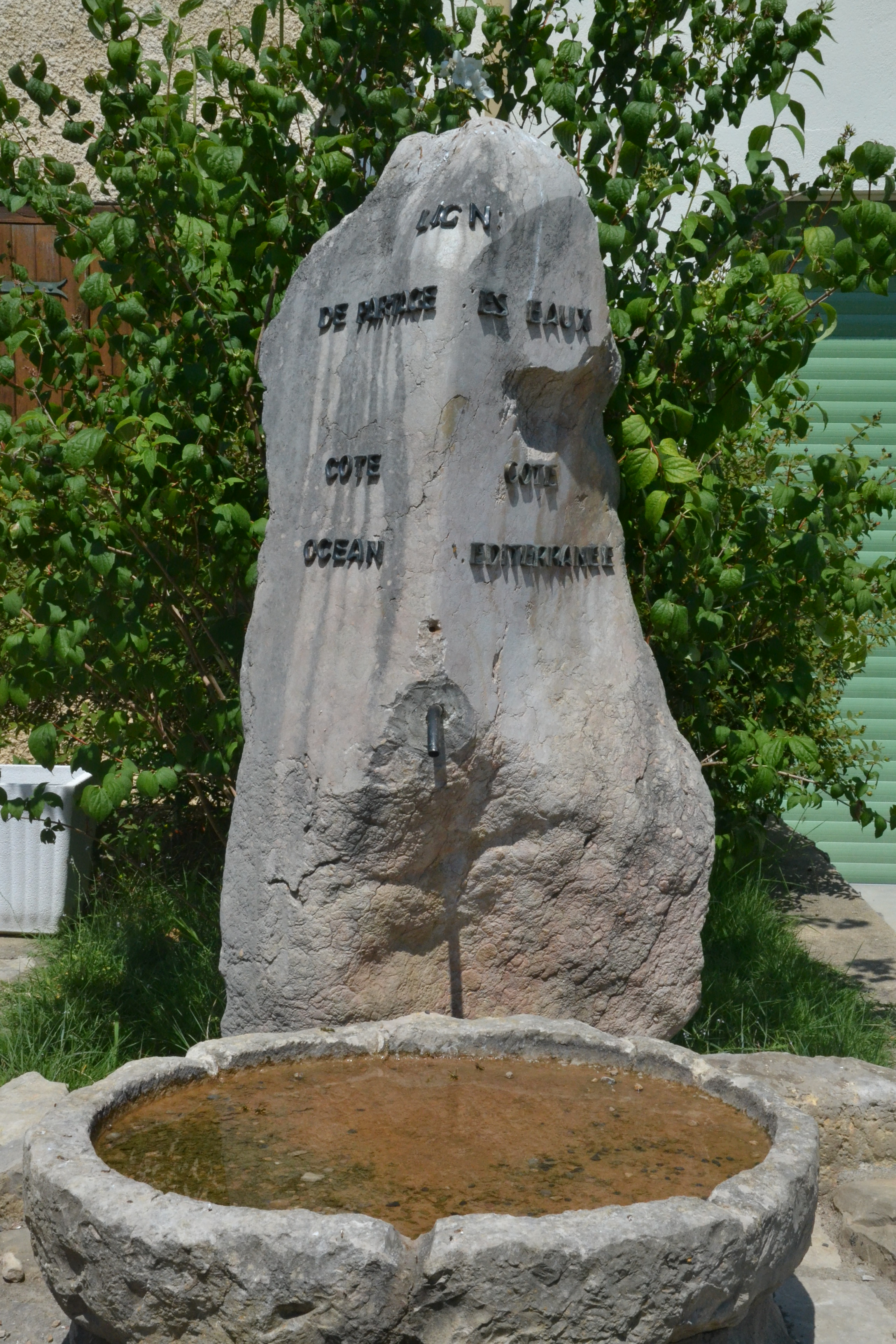 Monument évoquant le partage des eaux entre Atlantique et Méditerranée à Nébias (Aude, France).